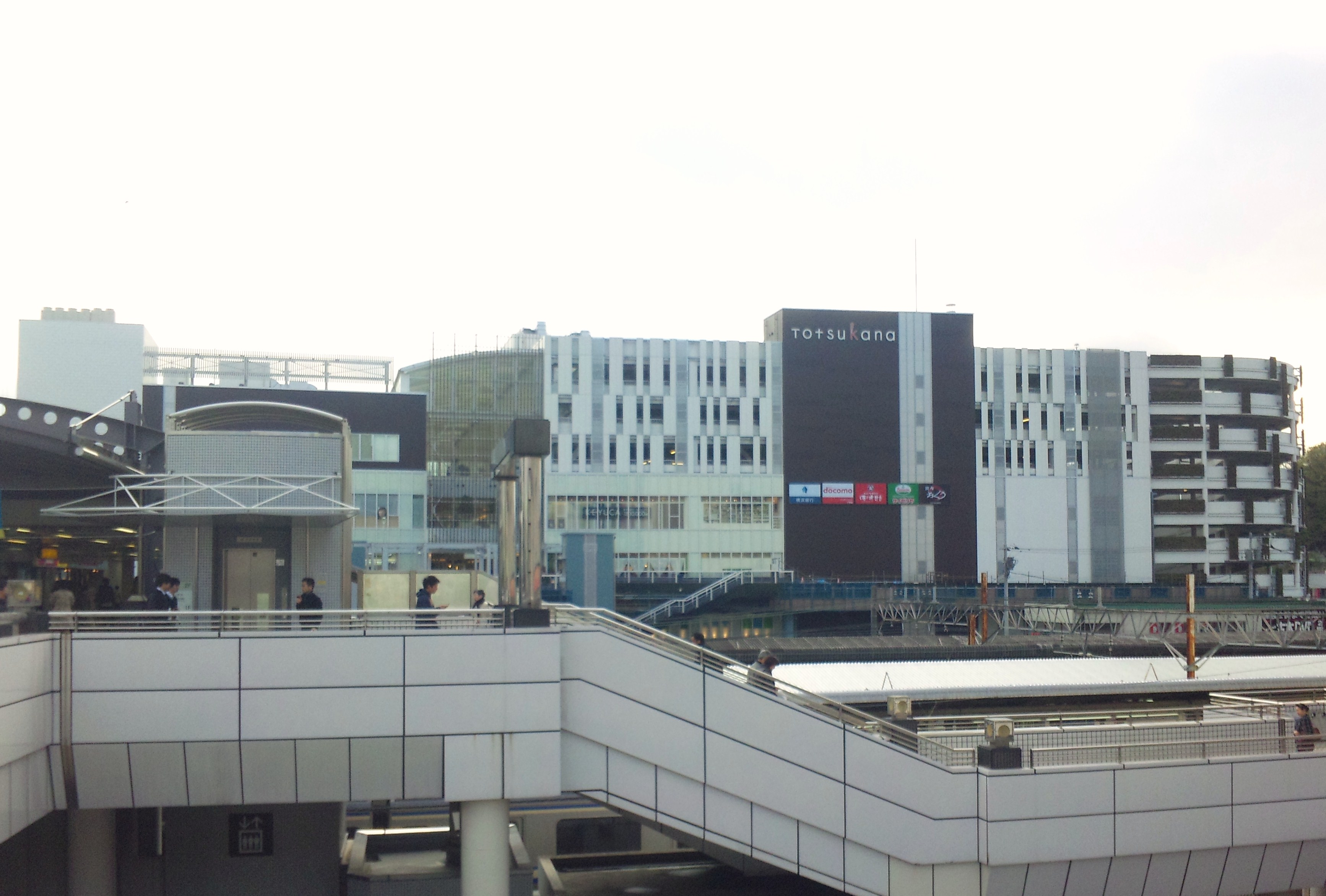 トツカーナの写真です。戸塚駅にて撮影。